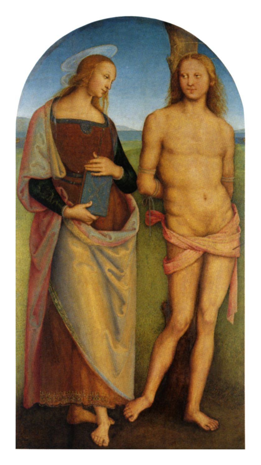 Pala di Sant’Agostino (Sant’Irene e San Sebastiano)